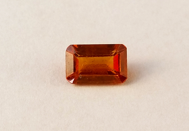 Facettierter Hessonit (Varietät des Granatminerals Grossular), ca.1ct, Sri Lanka